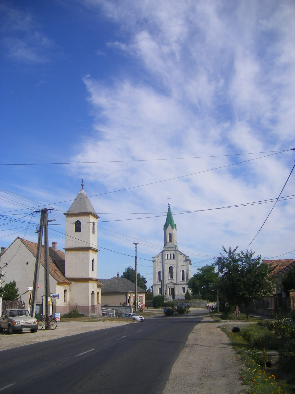 Nagygyimót